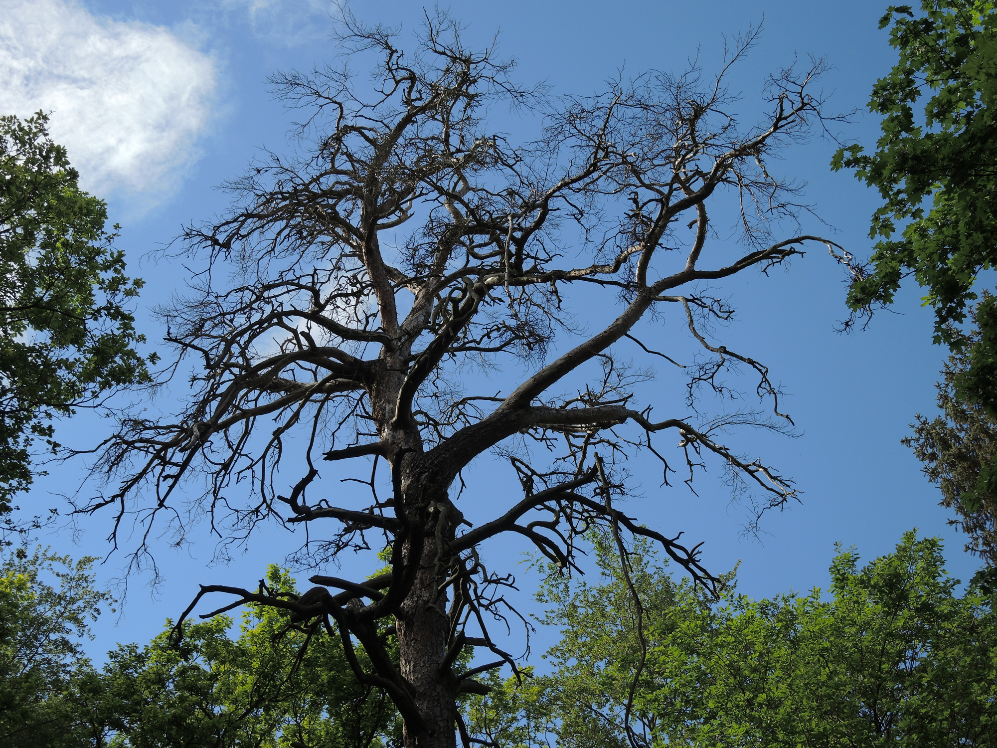 Naturdenkmal-Baum "Stolze Kiefer" im Hammerthal in Bad Freienwalde (Märkisch-Oderland). Alter Baum im Wald am Pfadrand nahe dem Umspannwerk.